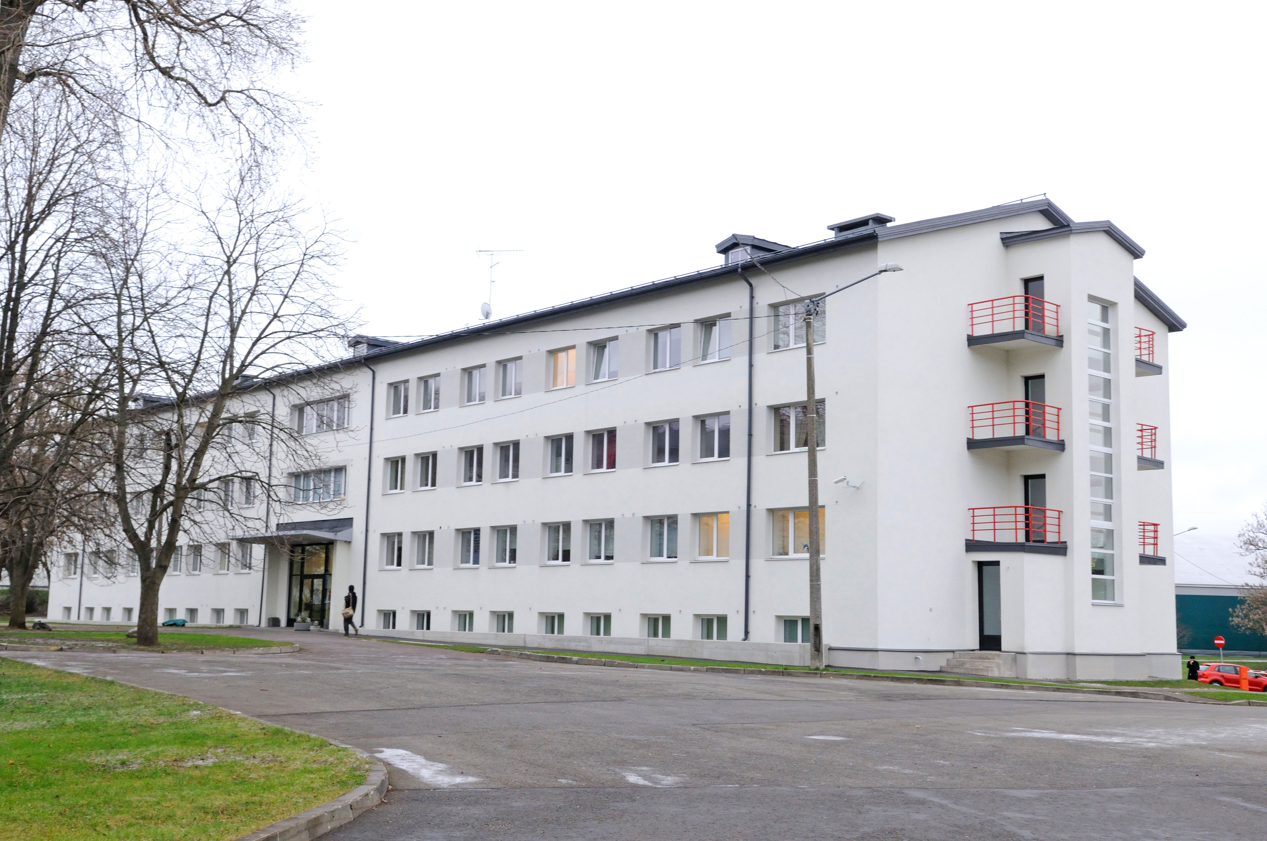 Audentese Spordigümnaasiumi õpilaskodu